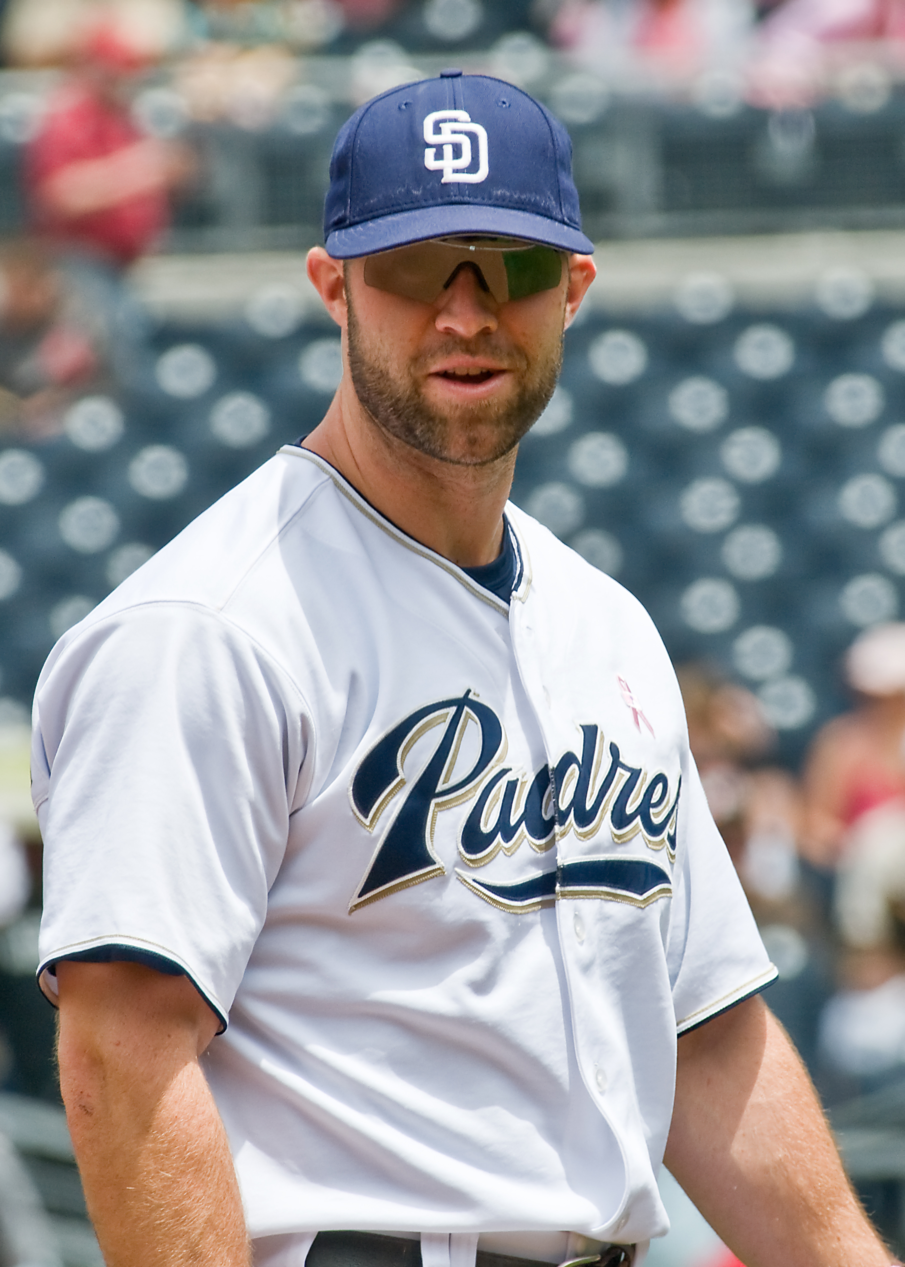 Kevin Kouzmanoff